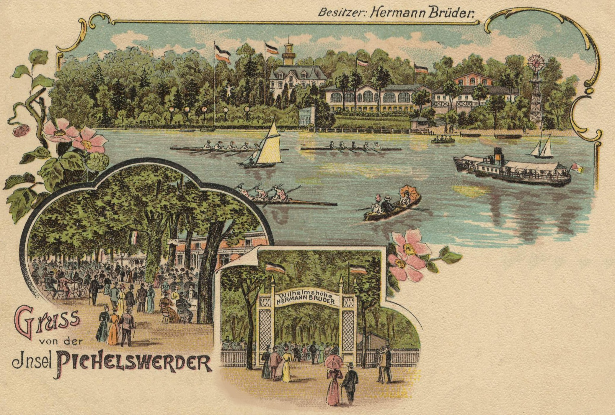 Die Halbinsel Pichelswerder im Jahre 1906